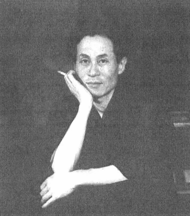 読売新聞社『家庭よみうり』383号（1954年）より藤沢桓夫